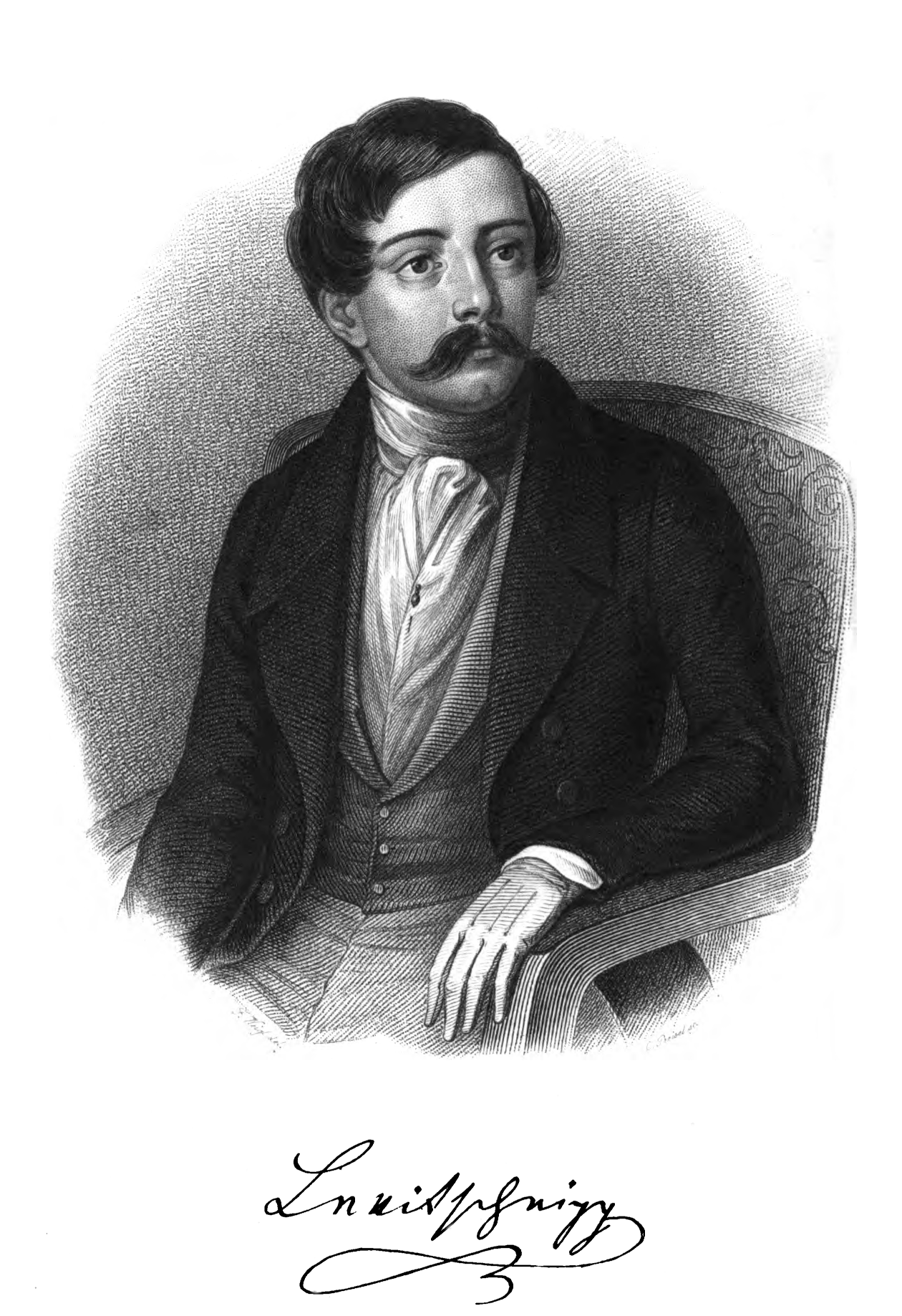 Porträt: Heinrich von Levitschnigg (25. September 1810 in Wien - 24. Januar 1862 in Wien) In: Gedichte. Mit einem Bildnisse und Facsimile des Verfassers. Pfautsch & Compagnie, Wien 1842